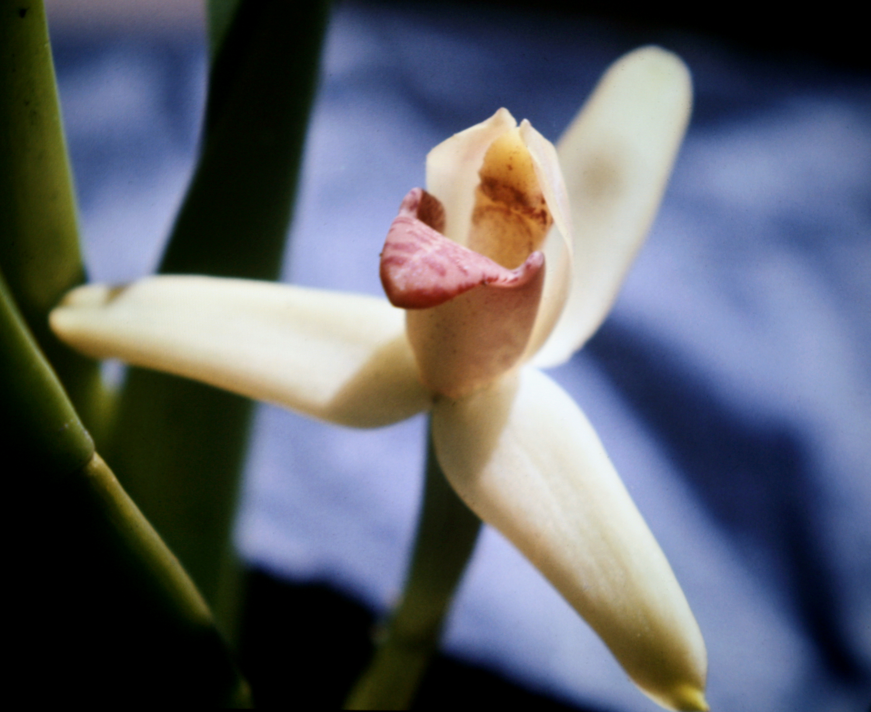 Heterotaxis violaceopunctata (Maxillaria violaceopunctata), Suriname.